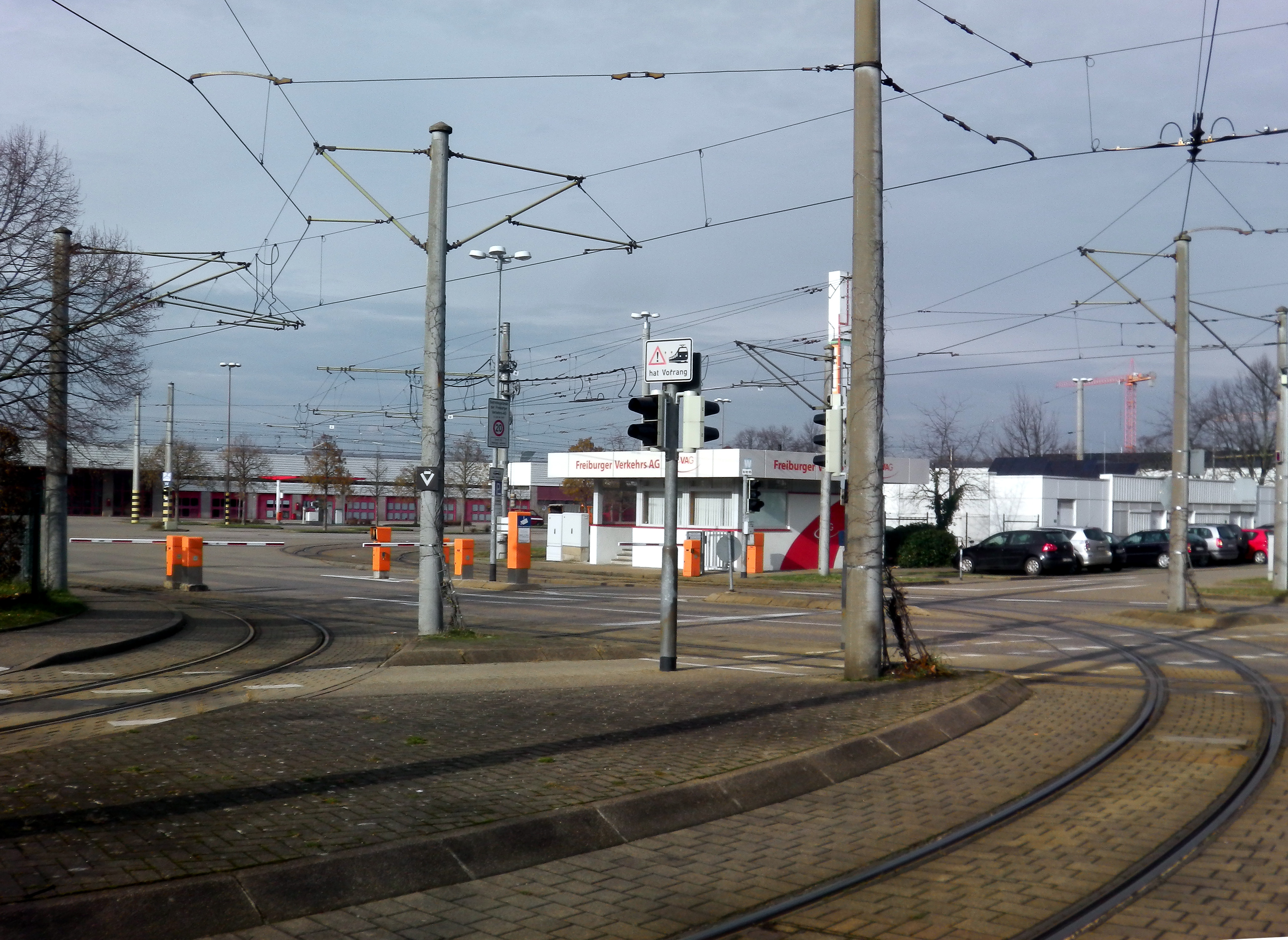 Einfahrt in den Betriebshof Süd